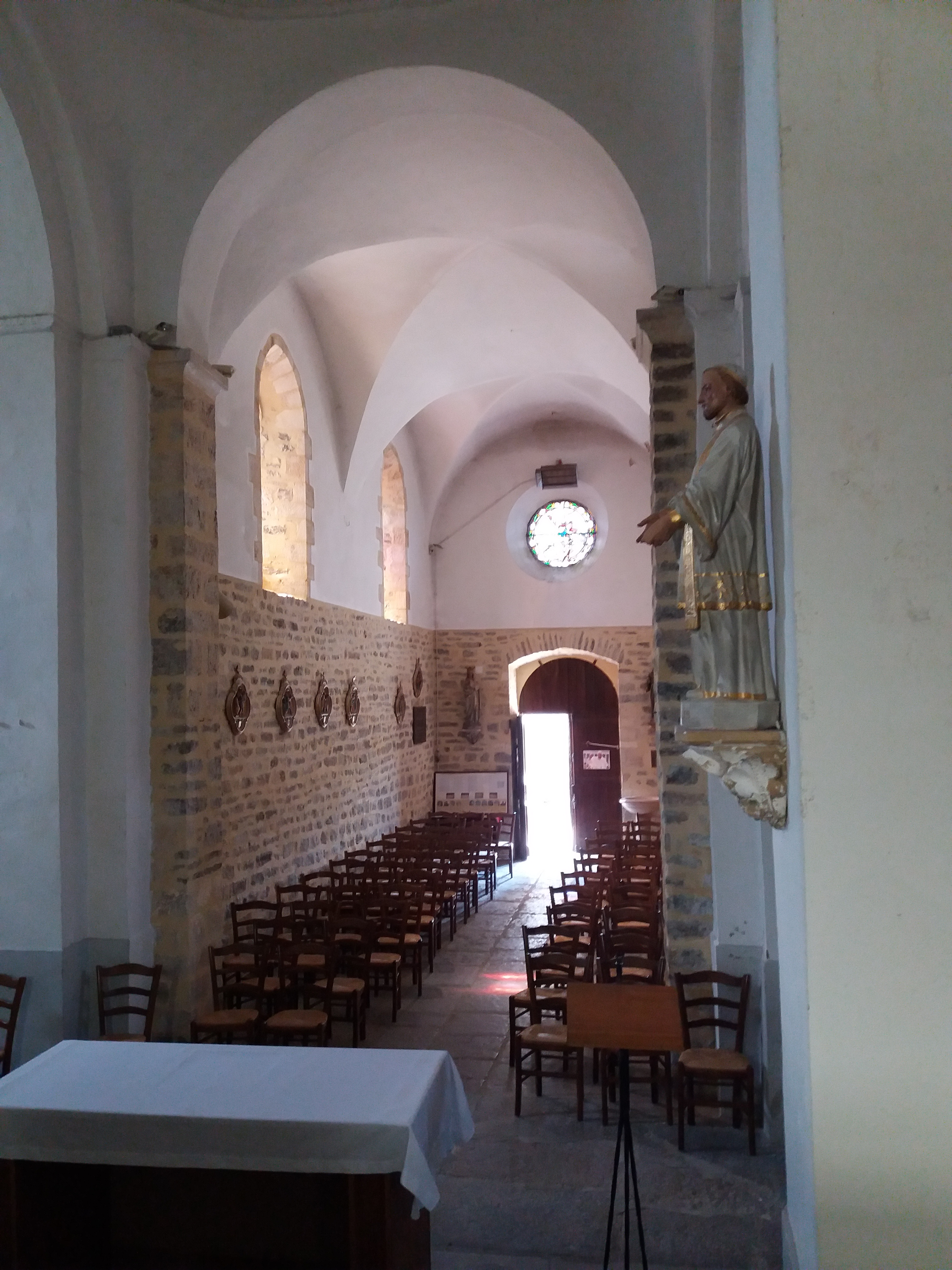 Nef depuis l'abside.